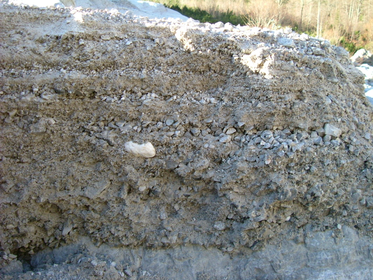 Schuttkörper im Wimbachgries; unterscheidliche Korngrößen zeigen die Schichtung im Schuttkörper und die Veränderungen in der Fließgeschwindigkeit während der Sedimentation an